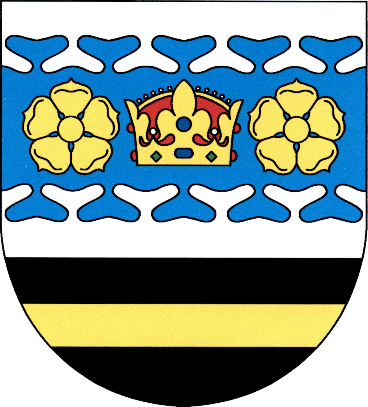 Znak obce Keblov